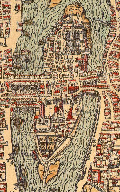 Île de la Cité (extrait)